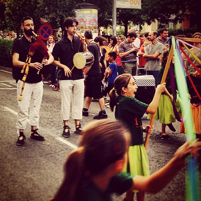 Mitja Cobla (sac de gemecs i flabiol i tamborí) tocant per un ball de cintes a la festa major de Sant Cugat del Vallès